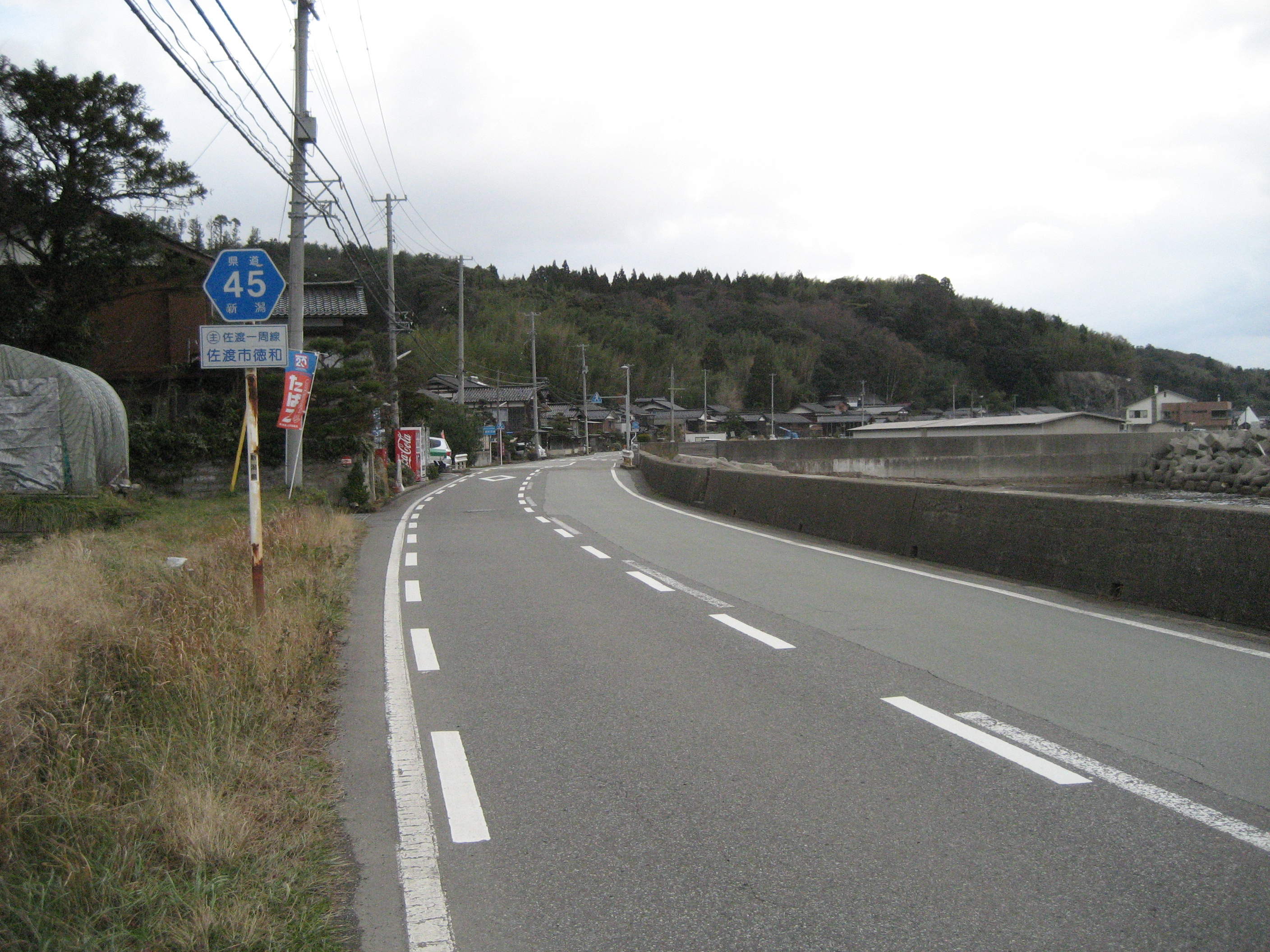 新潟県道45号線佐渡市内